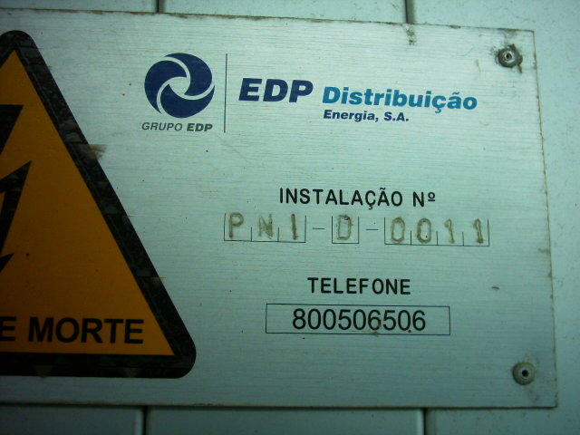 Torre de distribuição de electricidade. EDP. Serra d’El-Rei, Peniche, com código municipal PNI.)